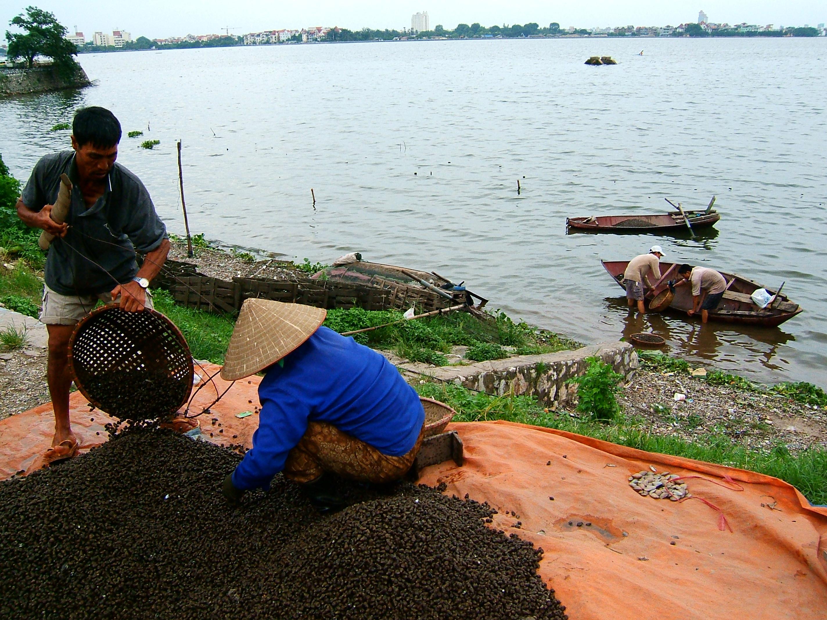 Đãi, nhặt ốc để bán là một trong những nghề của dân làng Xuân La ven hồ Tây.